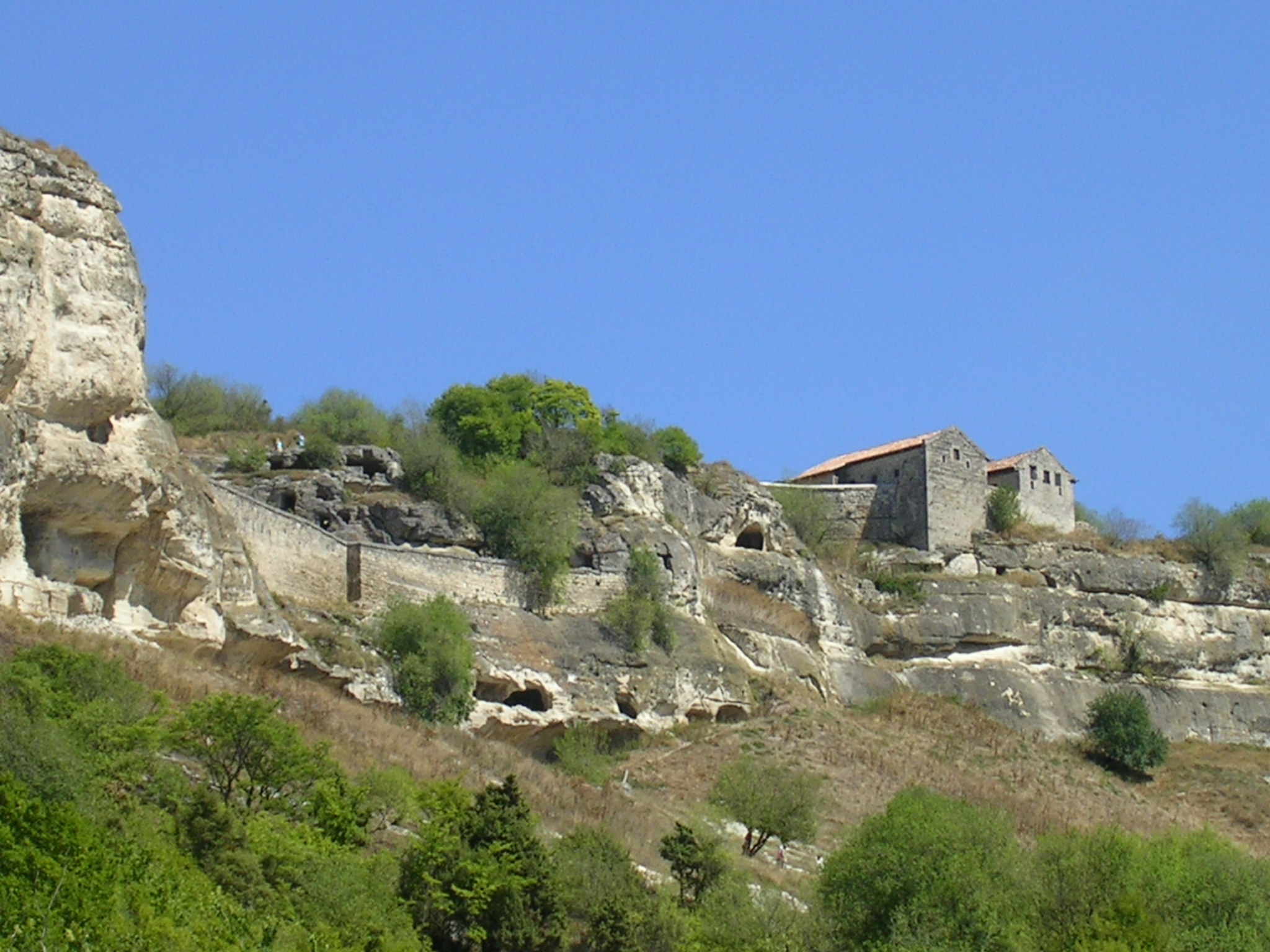 на подступах к Чуфут-Кале автор: Vasbur 15:24, 31 июля 2006 (UTC) Крым, 2005